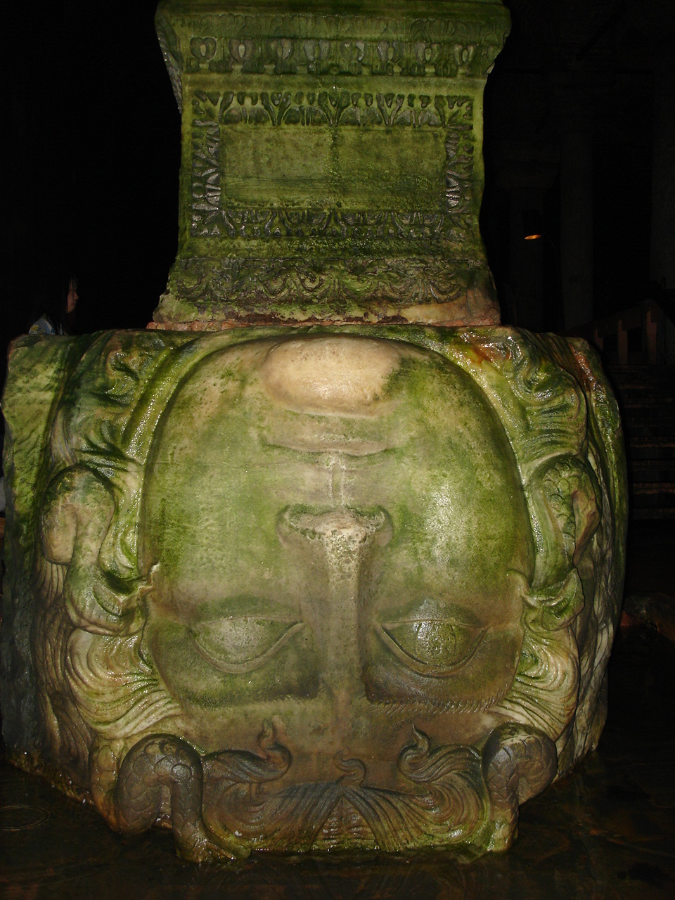 Istanbul: Testa colossale di Medusa, di epoca ellenistica, riusata in epoca bizantina, rovesciata, come basamento di colonna nella cisterna sotterranea vicino ad Hagia Sophia. Foto di: Giovanni Dall'Orto, 29-5-2006.